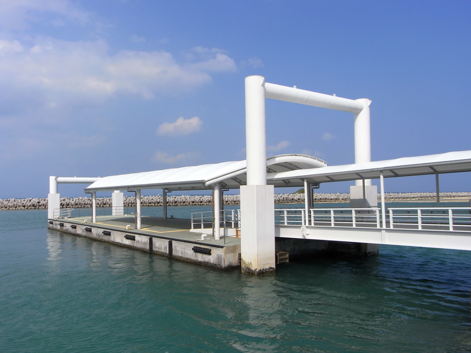 黒島港浮桟橋（沖縄県八重山郡竹富町黒島）